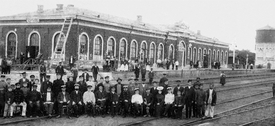 Ростовская область. Железнодорожный вокзал в Чертково